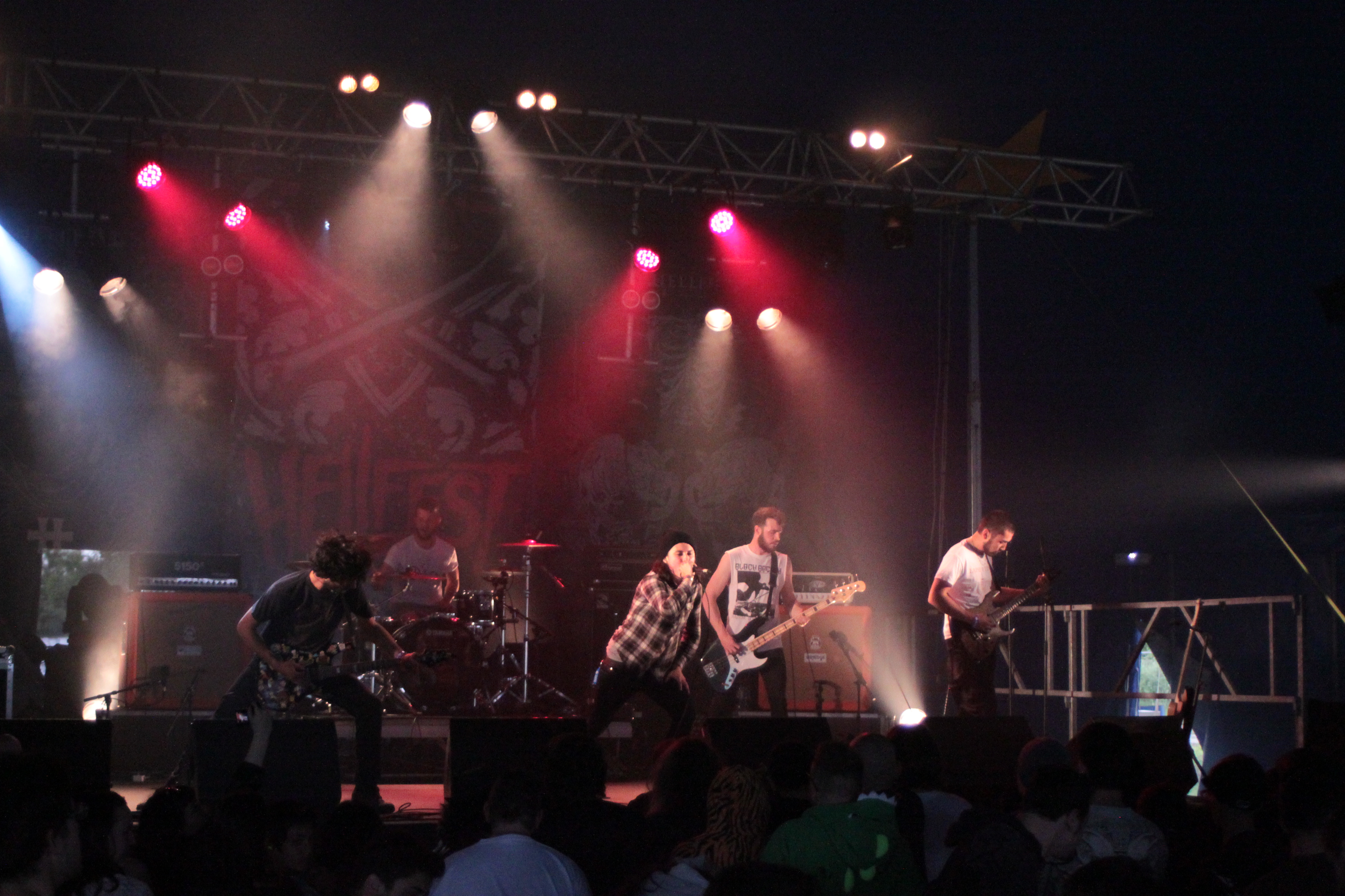 3llipse, Helfest 2013, Fr-44-Clisson.